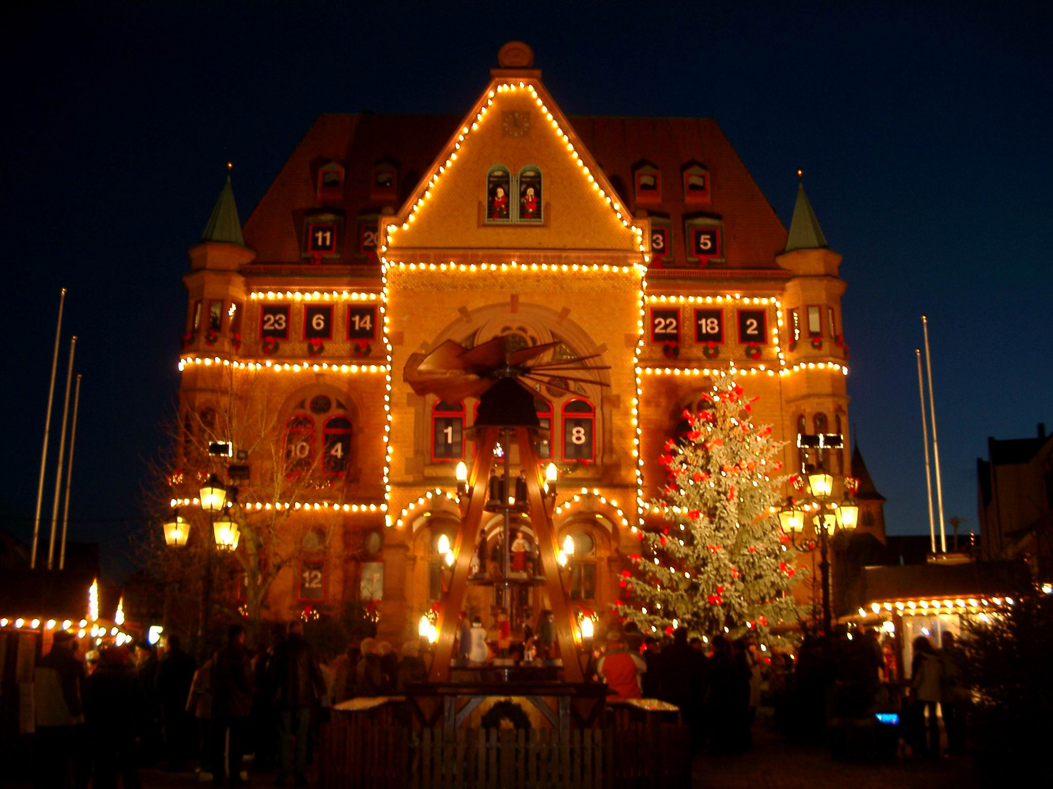 Rathaus Hünfeld Adventskalender